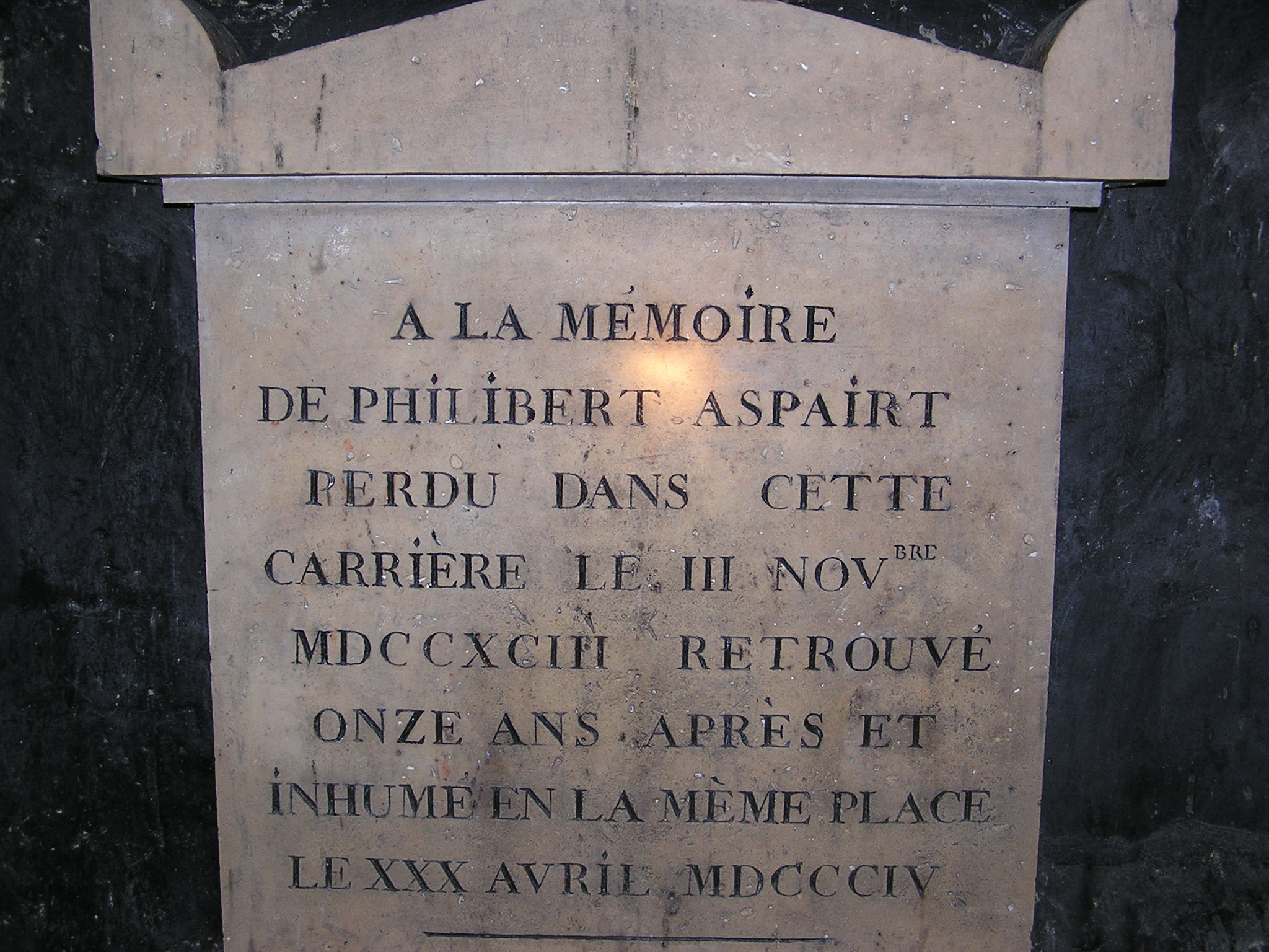 Stèle Philibert Aspairt dans les catacombes de Paris 021103